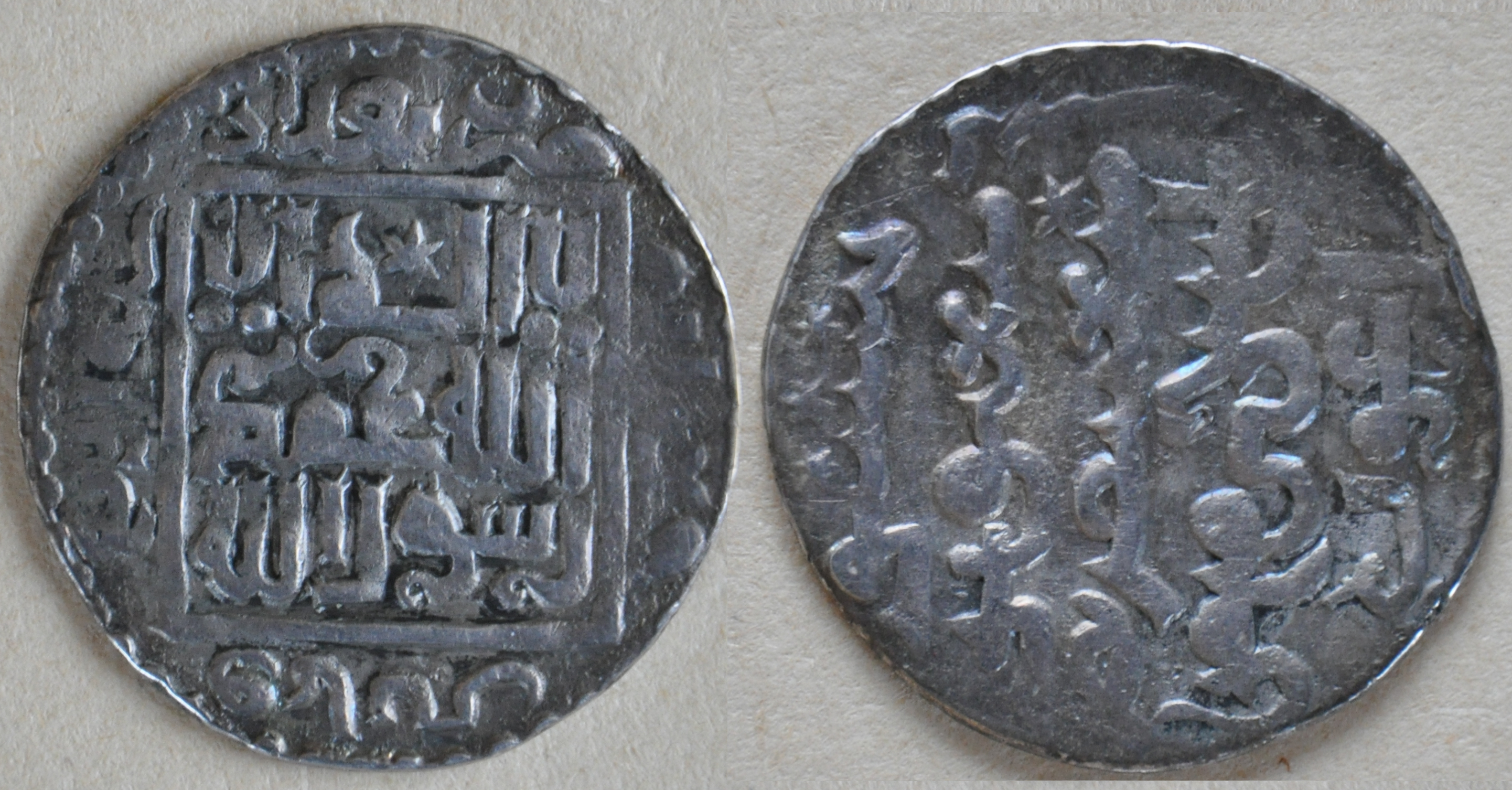 1 dirham en argent de la dynastie ilkhanide en Iran du ilkhan Arghun ibn Abaga (AH 683-690, 1284-1291 AD) éditée à Tabriz en AH 685 (1286 AD) 21,85 mm, 2,3 g. Référence : Mitchiner WI 1574